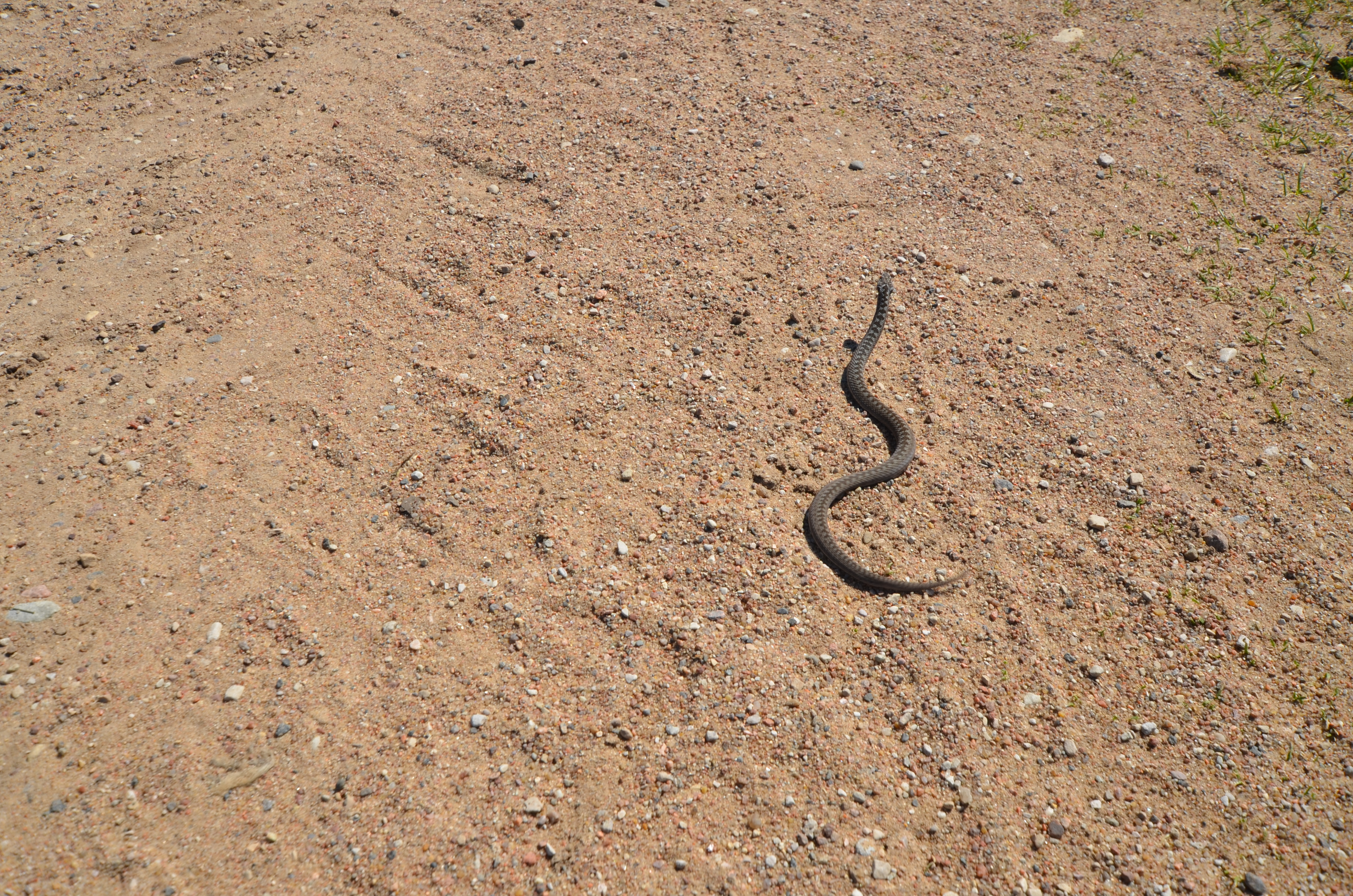 мясцовыя насельнікі